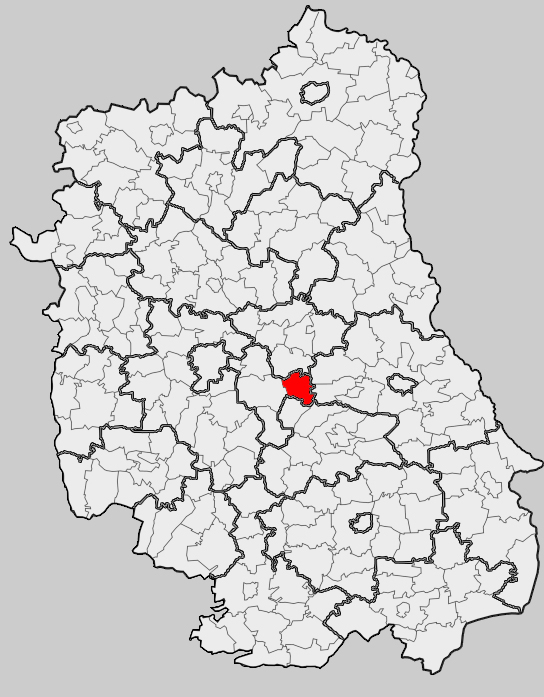 Map of gmina Trawniki, Świdnik county, Lublin voivodship Mapa gminy Trawniki, powiat świdnicki, województwo lubelskie